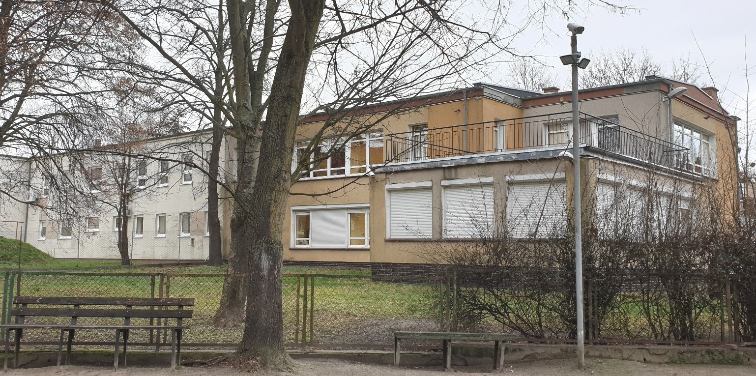 Stargard. Były żłobek Luxpolu